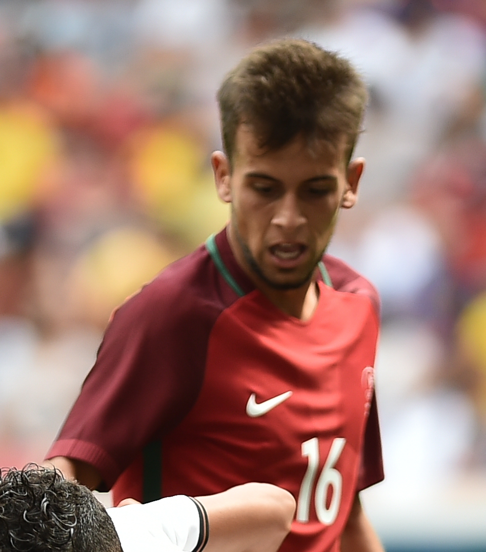 Estádio Nacional de Brasília Mané Garrincha, Brasília, DF, Brasil, 13/8/2016 Foto: Andre Borges/Agência Brasília Portigal e Alemanha jogam neste sábado (12), no Estádio Mané Garrincha, pelas quartas de final do futebol masculino nas Olimpíadas 2016.